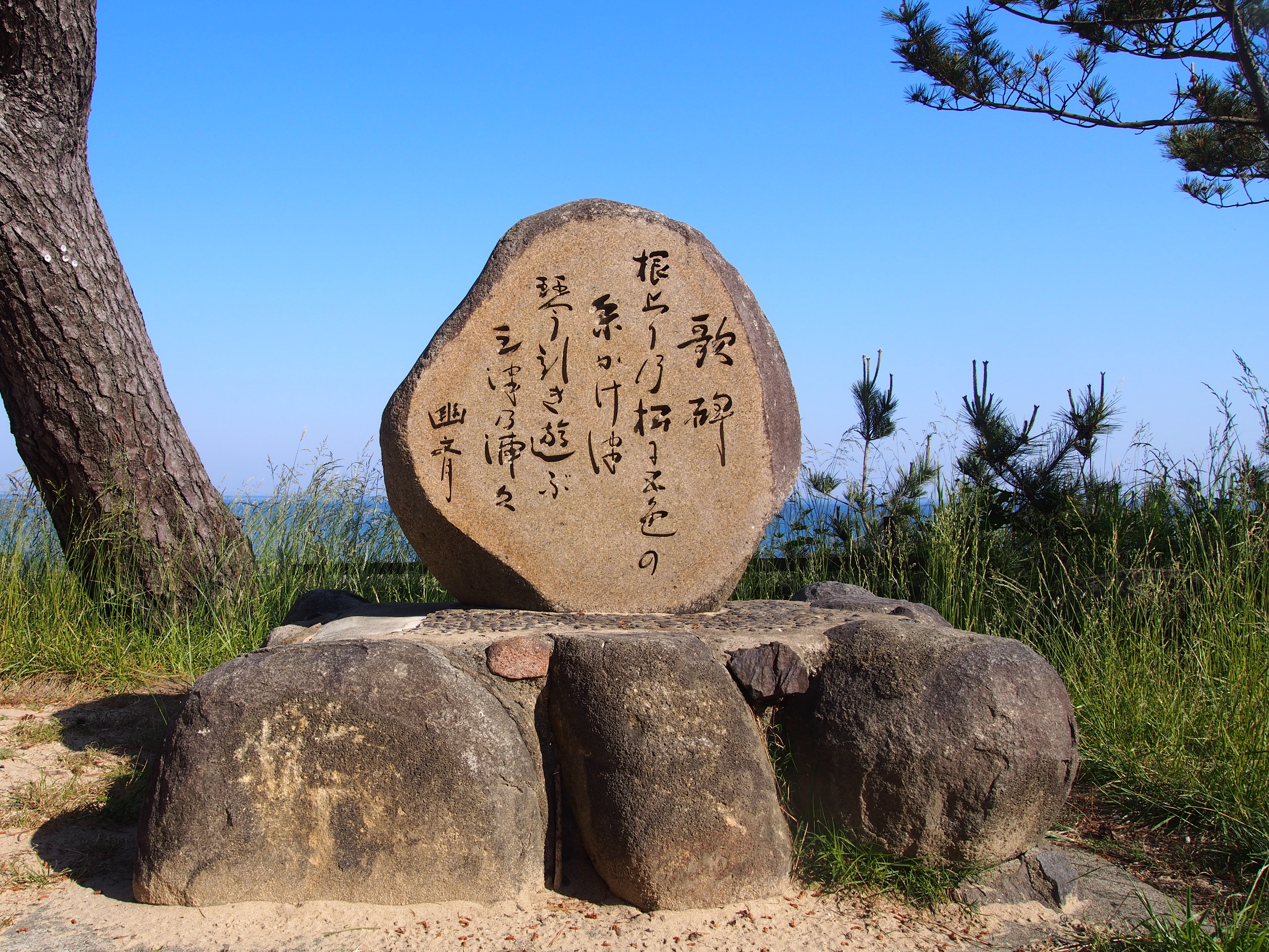 琴引浜（京都府京丹後市網野町掛津）に建立された、細川幽斎作と伝えられる和歌の碑。